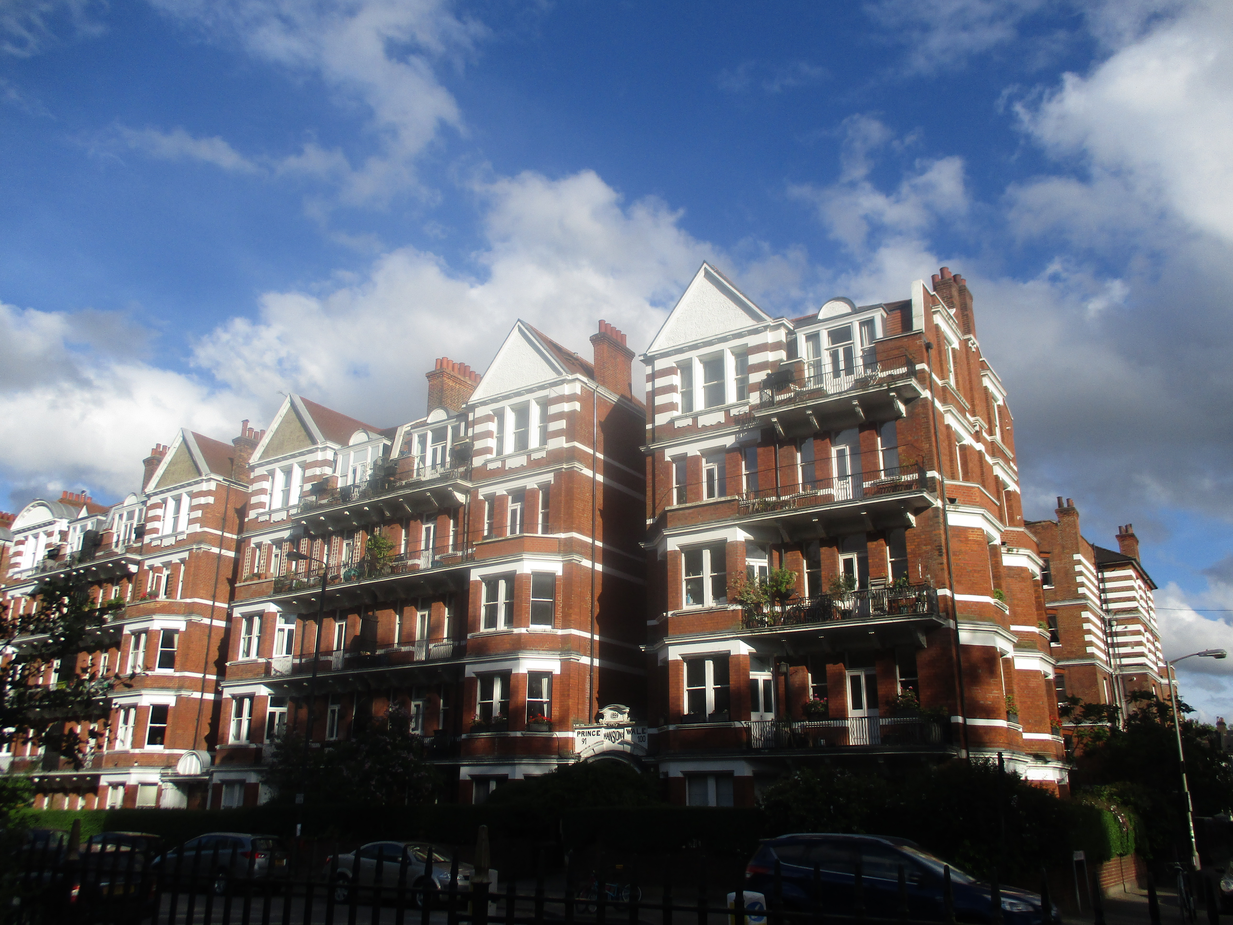 Prince of Wales Mansions donnant sur le Prince of Wales Drive. Londres, au bord du Battersea Park.